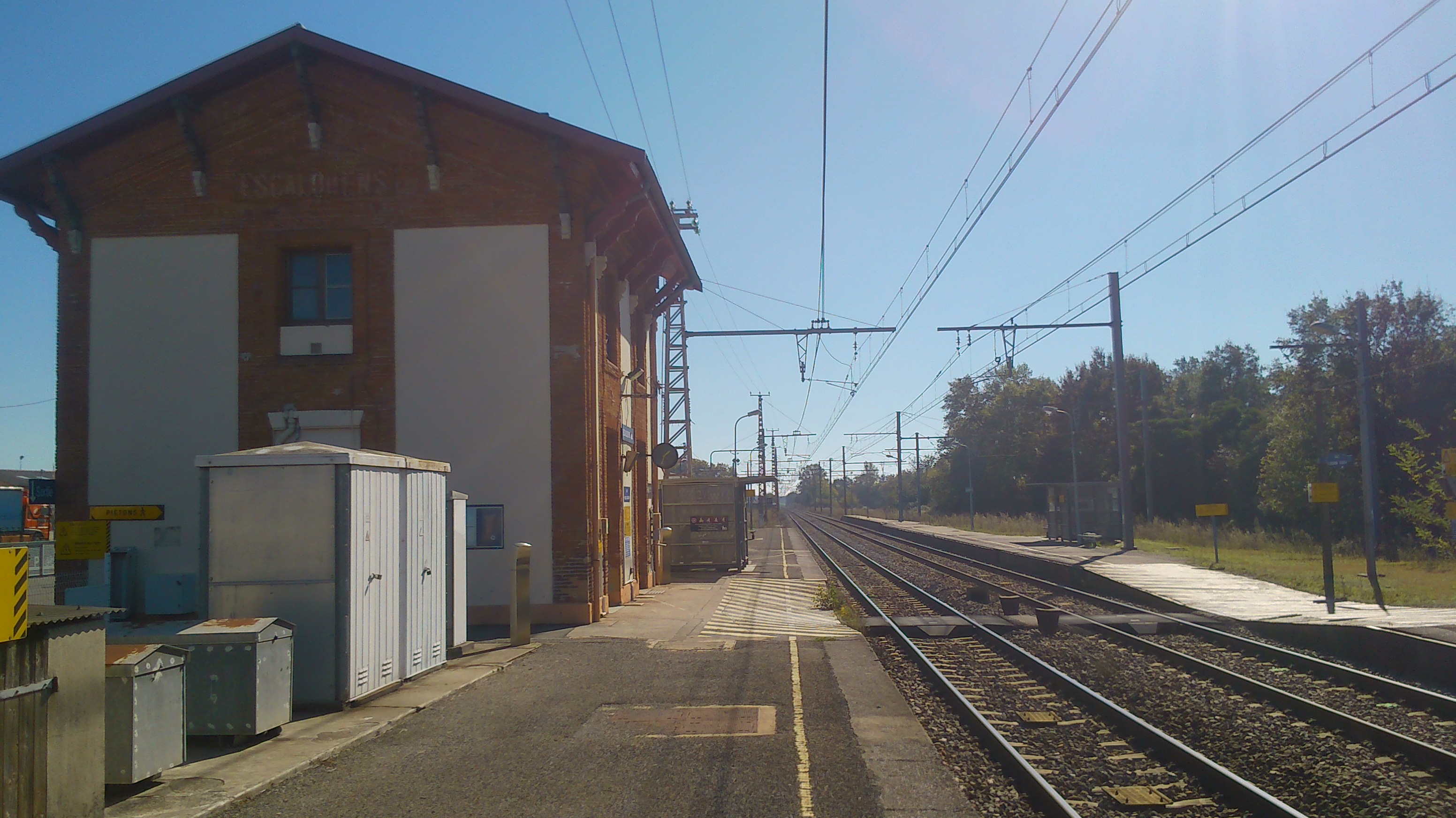 Les quais de la gare d'Escalquens